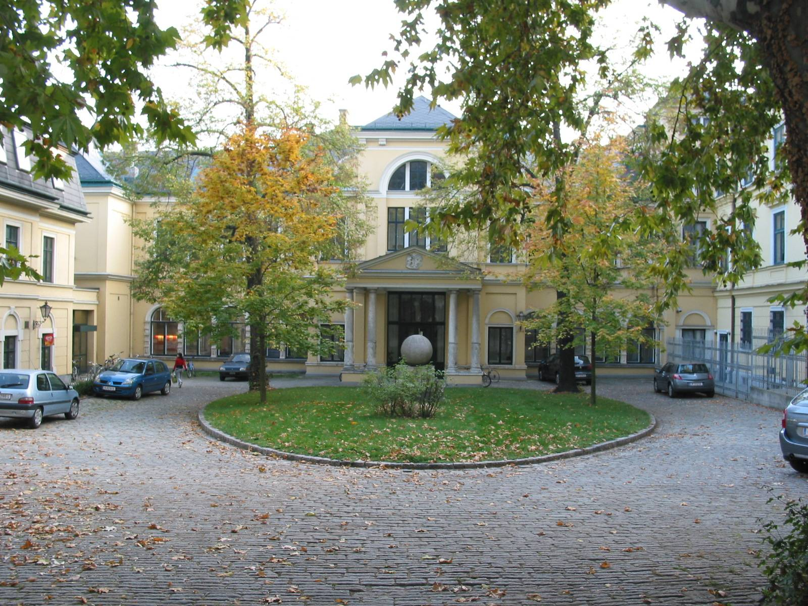 de: Palais Cumberland (Reinhardt-Seminar) in Wien en: Palais Cumberland (Reinhardt-Seminar) in Vienna